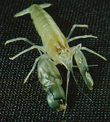 卡搭蝦（Alpheus heterochaelis）。